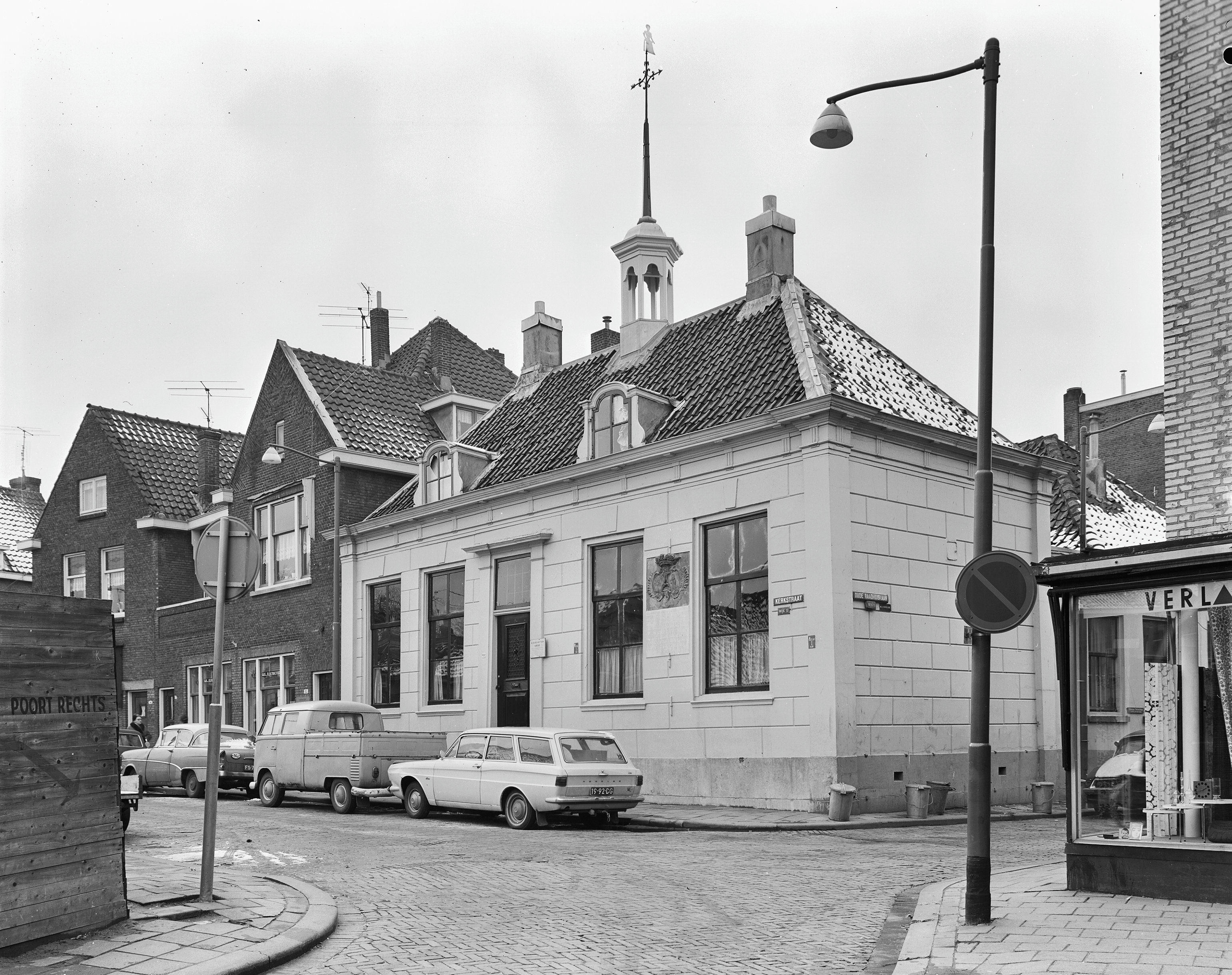 Raadhuis v.m.: voorgevel